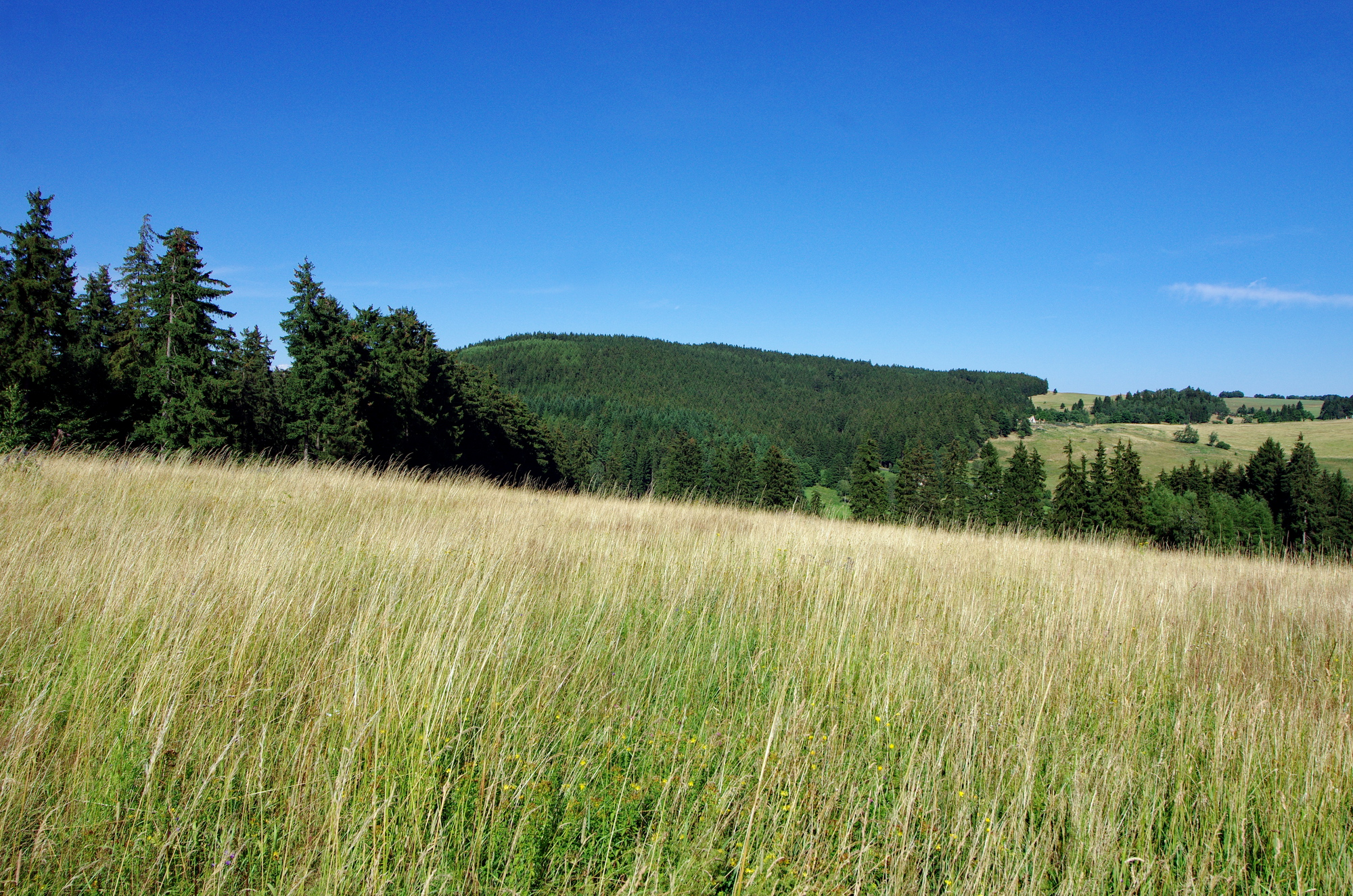 Vrch Rozhledy (859 m) Slavkovský les, pohled od zaniklého Vranova přes údolí Lobezského potoka